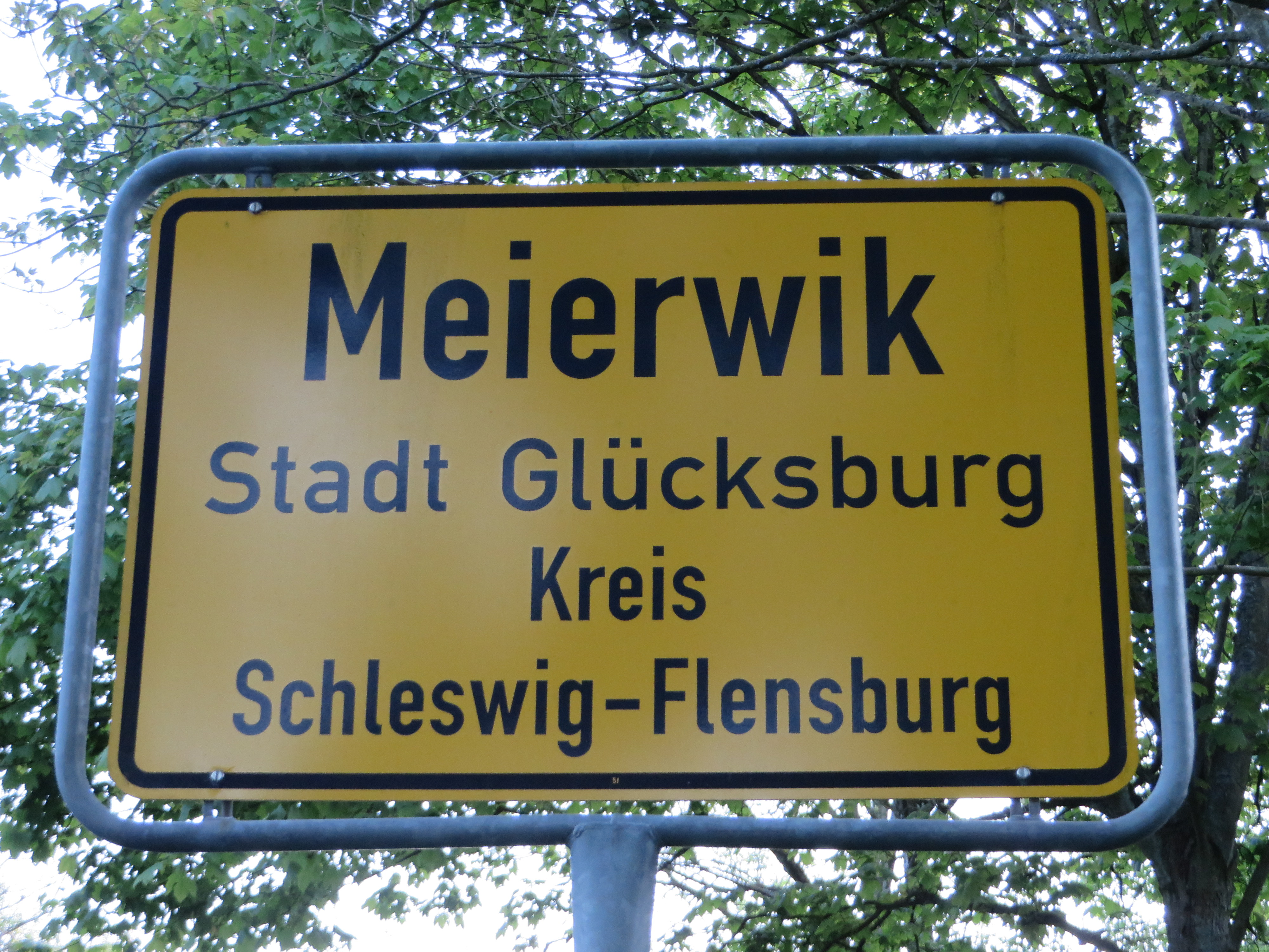 Ortsschild von Meierwik